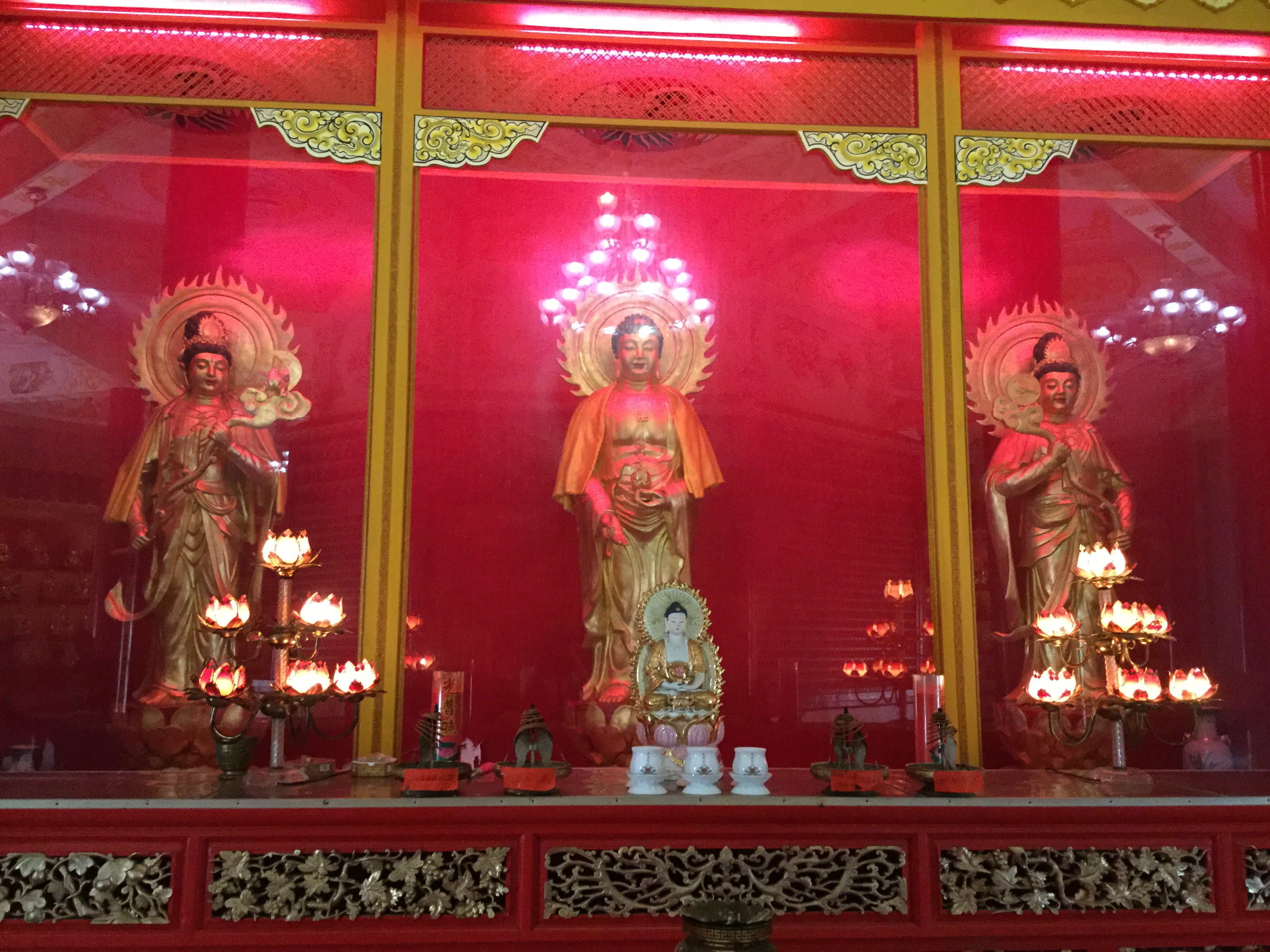 东方三圣，汕头天坛花园